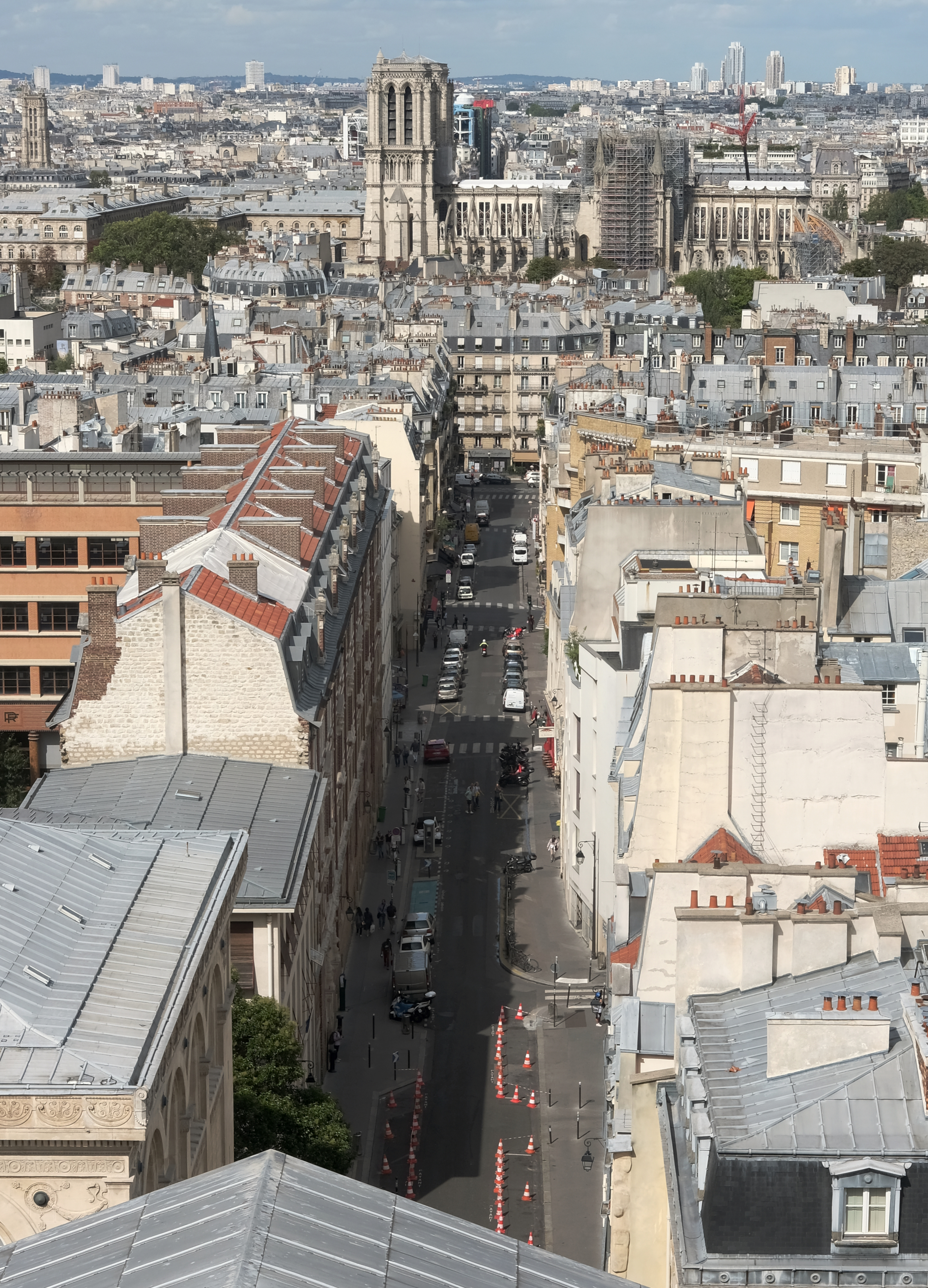 Paris V - Rue Valette et rue des Carmes vues depuis la coupole du Panthéon ; en arrière-plan, Notre-Dame de Paris.